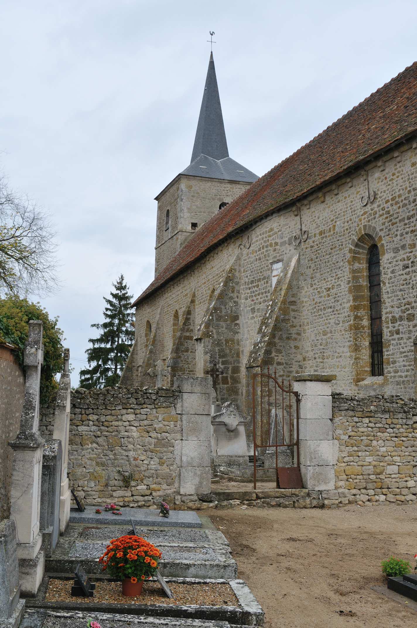 Église Saint-Denis, Dadonville, Loiret, France